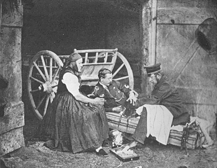 Deutsch-Französischer Krieg, Ambulanz zu Fröschweiler, deutscher Feldscher